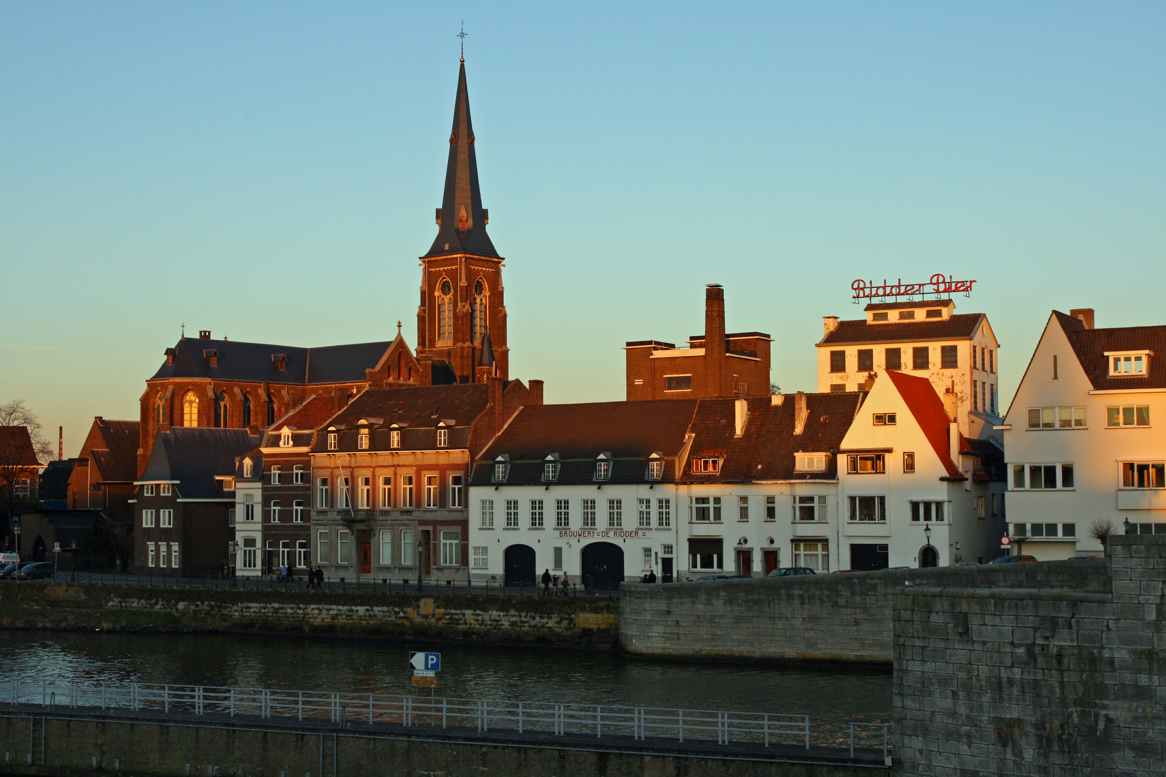 Abendstimmung